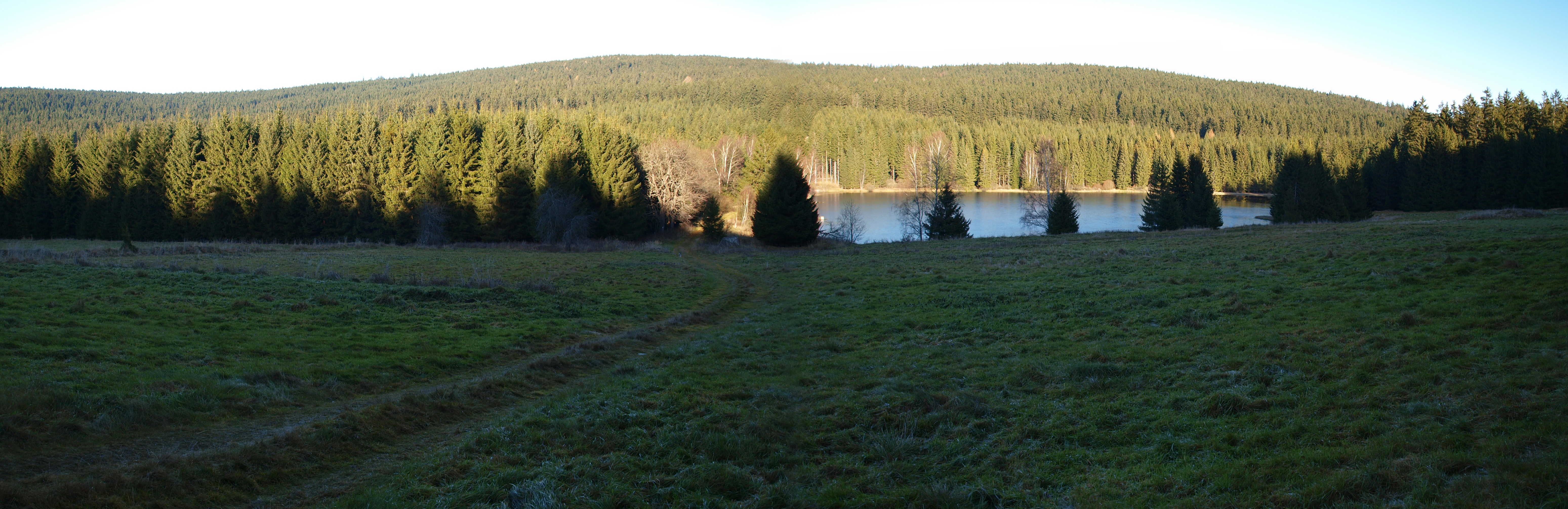 Klauzura Zlatá Ktiš v Novohradských horách